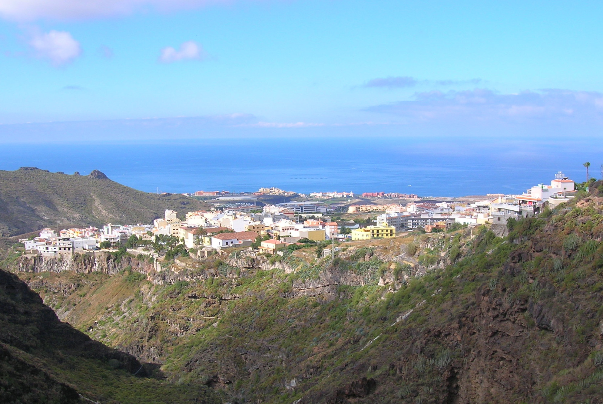 Adeje, Tenerife. View from Barranco del Infierno.